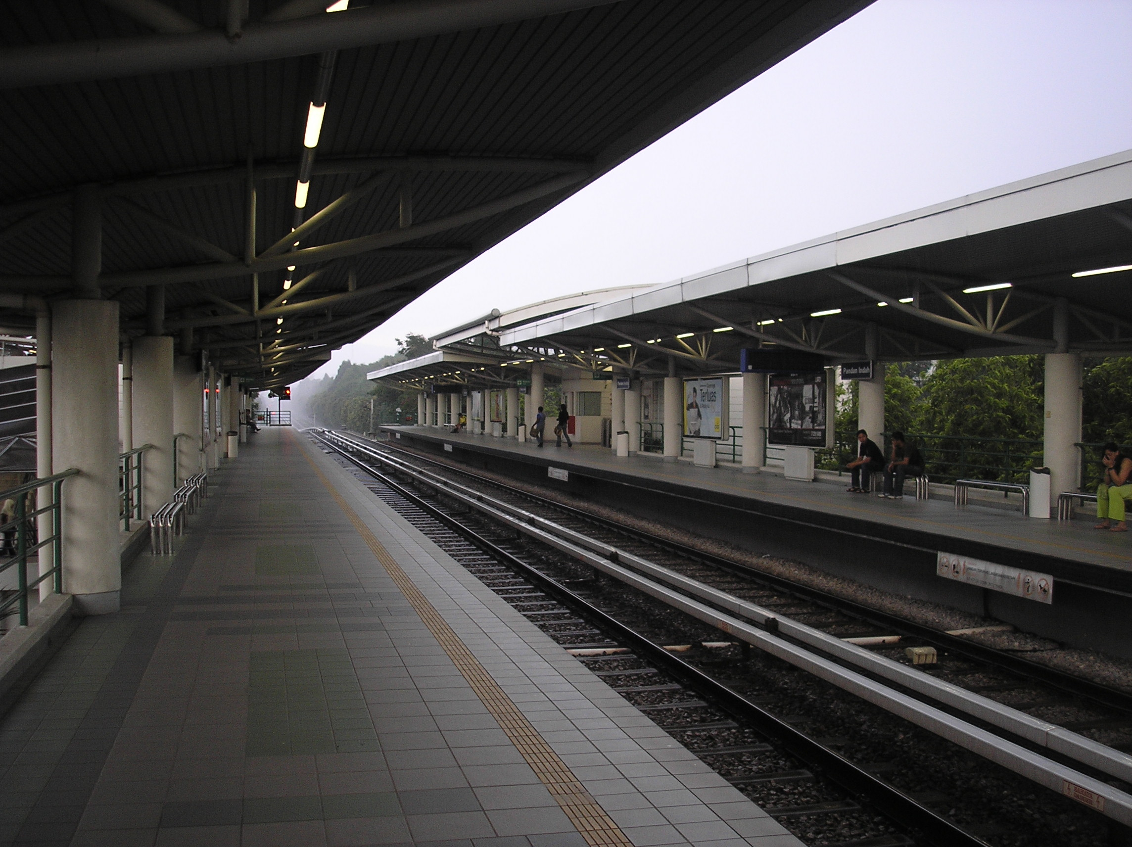 The Pandan Indah LRT station (Ampang Line), Selangor, Malaysia.